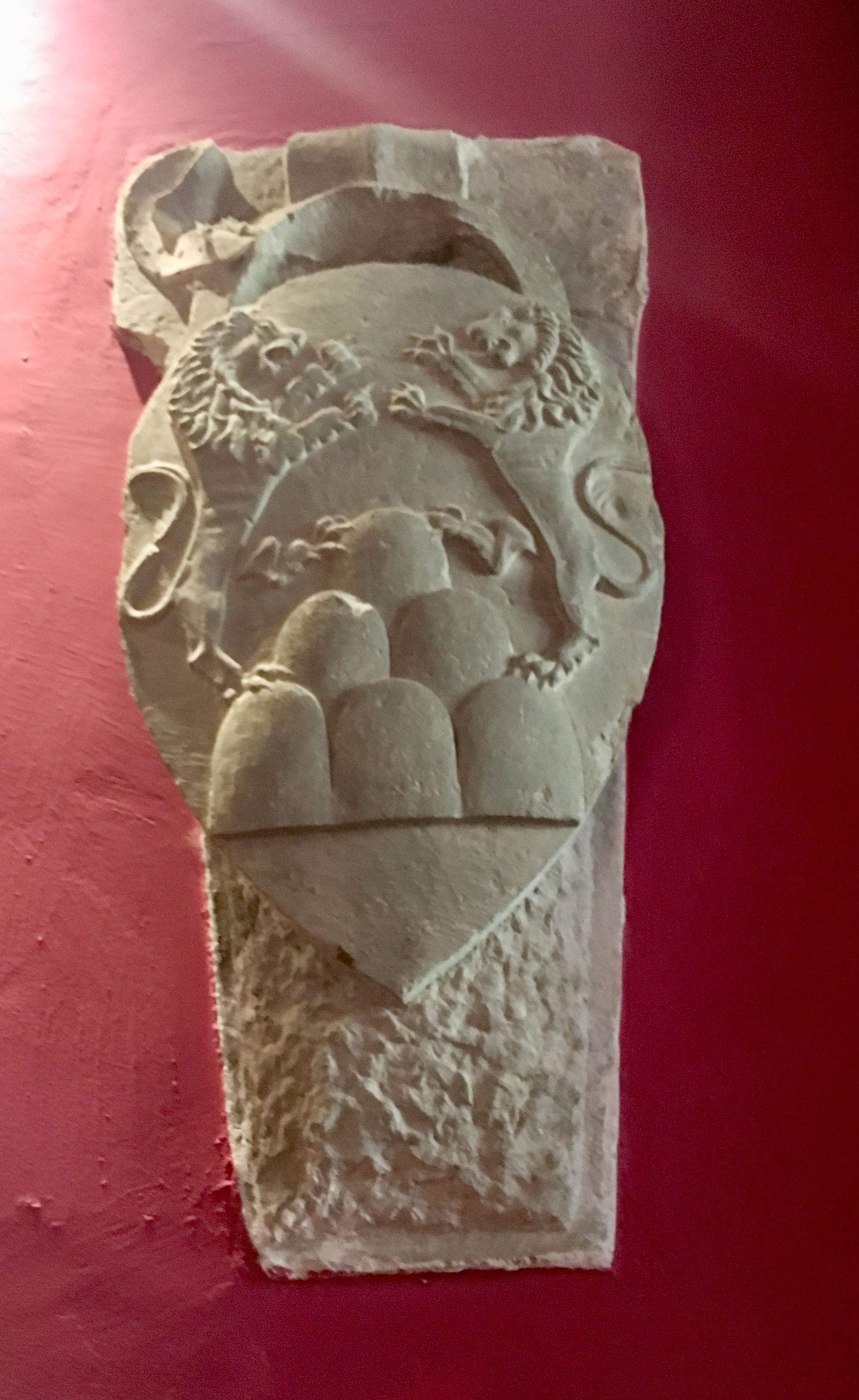 Le Murate Firenze. Stemma araldico della famiglia de' Benci raffigurante due leoni rampanti affrontati